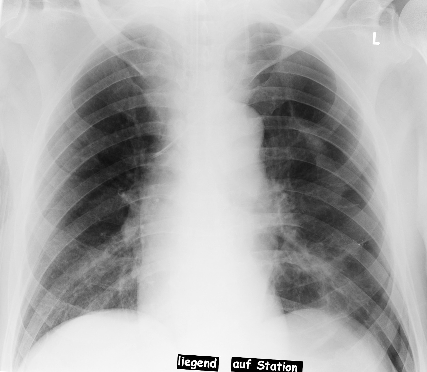 Pneumothorax im Liegen. Typischer Befund: Intubierter Patient mit ZVK von links. Typisch für den Pneumothorax im Liegen ist die Hypertransparenz der Zwerchfellkuppe auf der betroffenen Seite (links). Ausserdem lässt sich in diesem Fall die losgelöste Pleura erkennen. Am besten lässt sie sich links apikal in einem Abstand von etwa 1 cm von der Thoraxwand erkennen. Cave: Diese Zeichen kann beim Thorax im Liegen vollständig fehlen, da sich die freie Luft in der Pleurahöhle ventral und nicht apikal sammelt. Zusätzlich weist die Lunge eine Faltenbildung mit Verdichtungen im linken Lungenmittel- und Oberfeld auf.